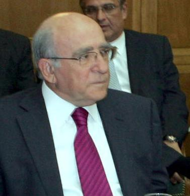 Γιώργος Σουφλιάς